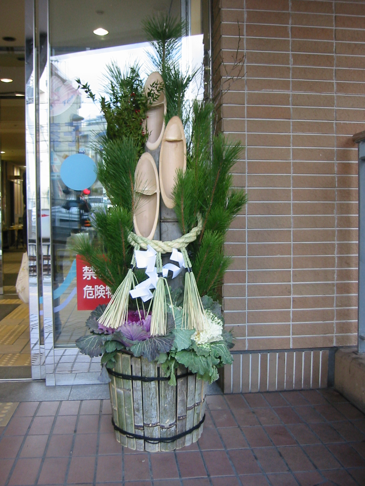 門松(関西風?) 神戸のスーパーにて